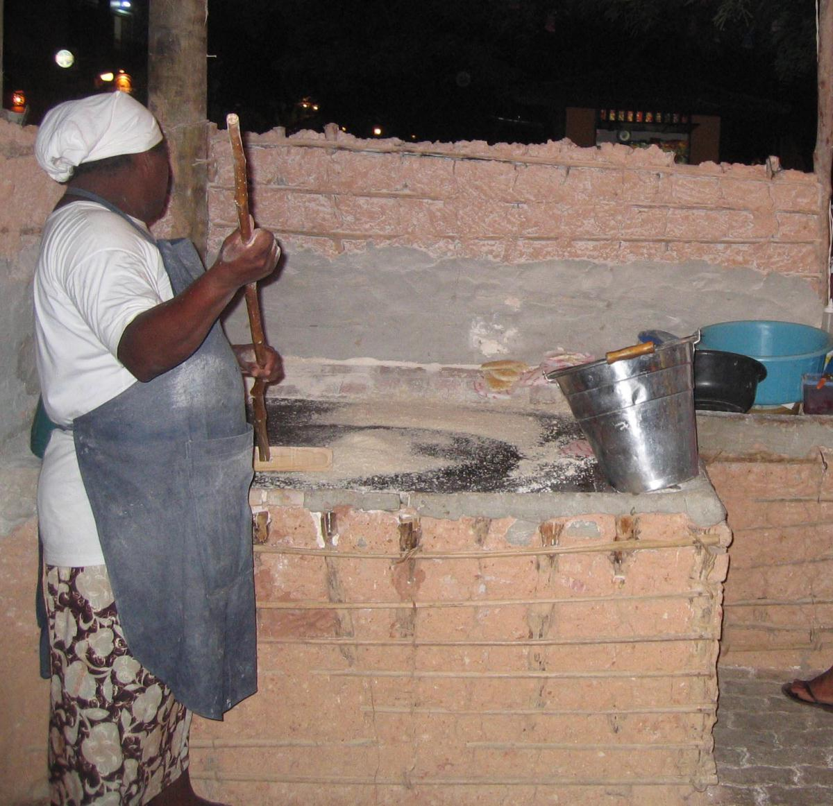 Mandioka, Praia do Forte, Bahia, Brazil